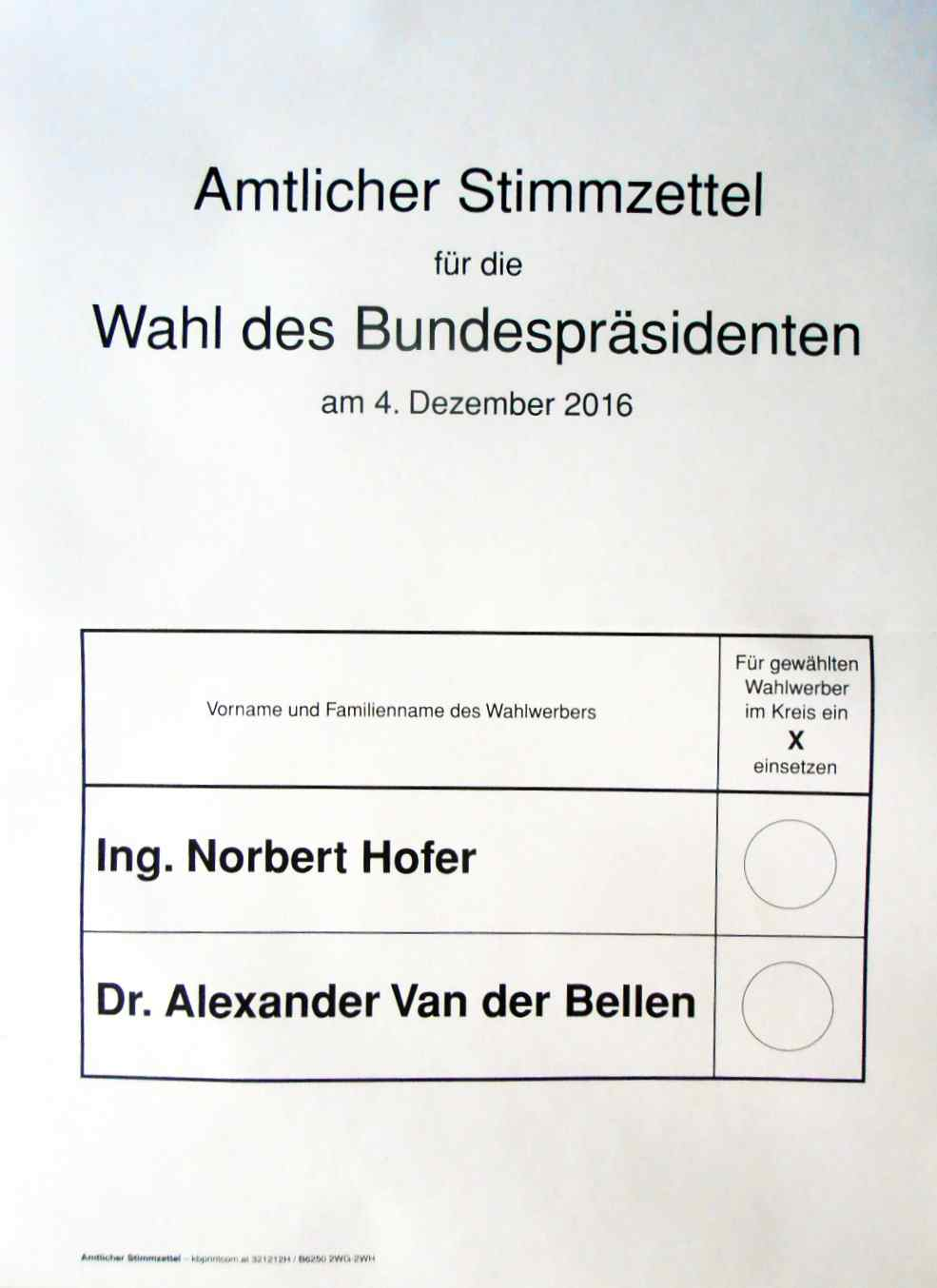 Amtlicher Stimmzettel der Bundespräsidentenwahl 2016 (3. Wahlgang, die Zweite)